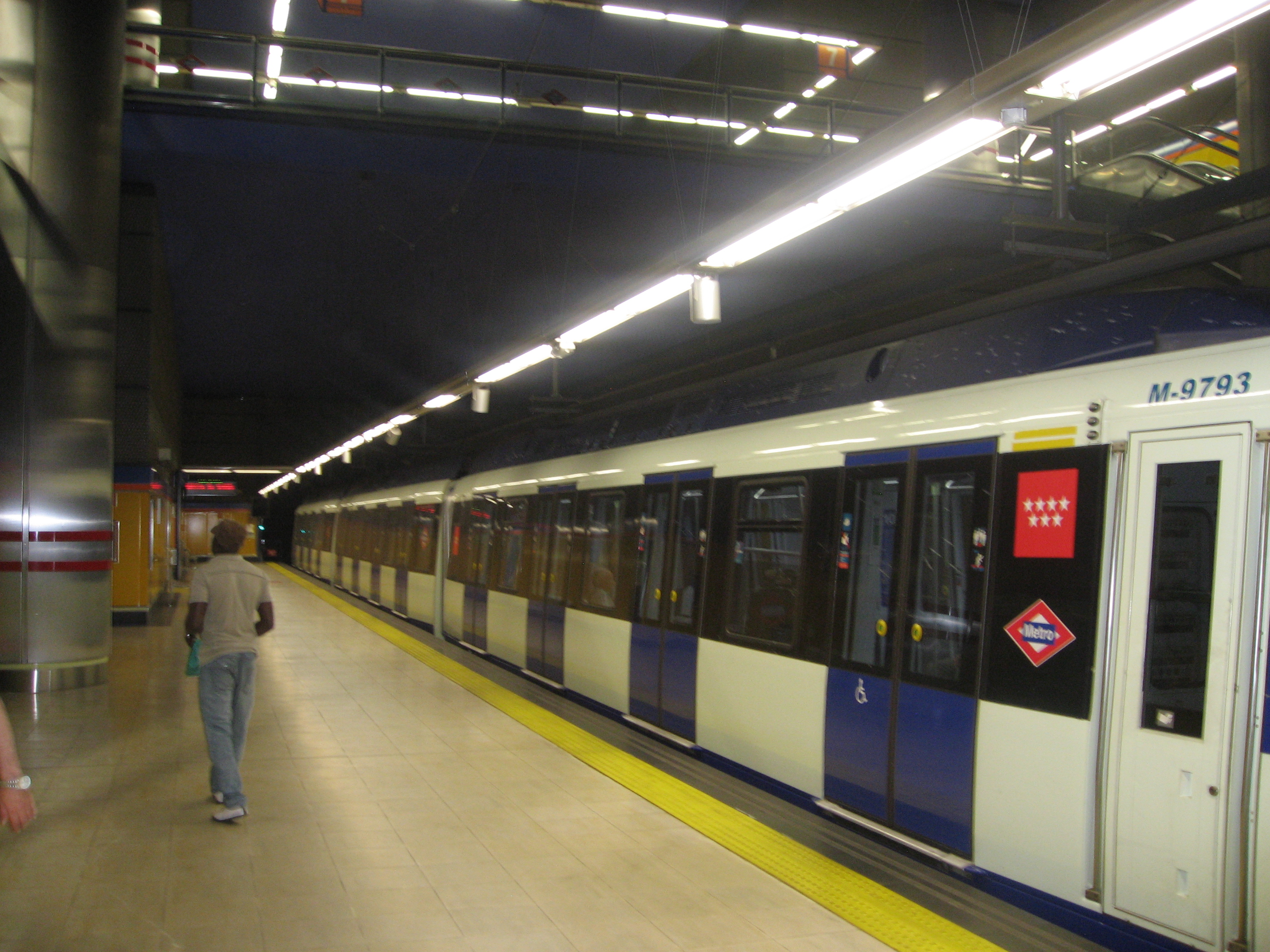 Vagón de metro en la estación de La Rambla